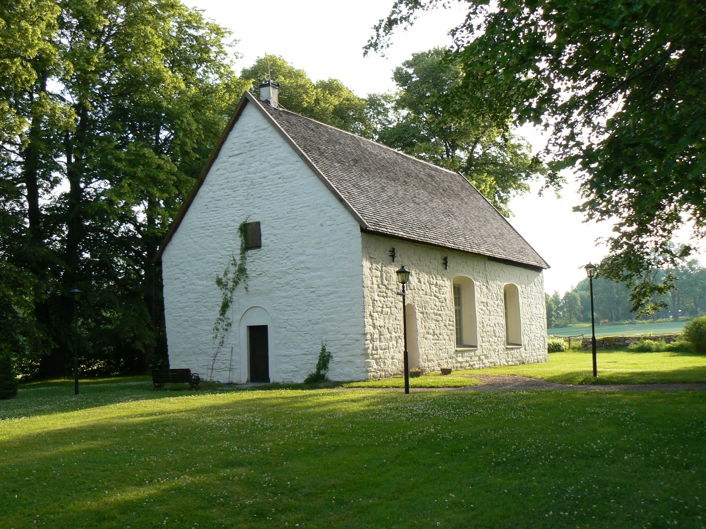 Old church in Hidinge, Lekeberg